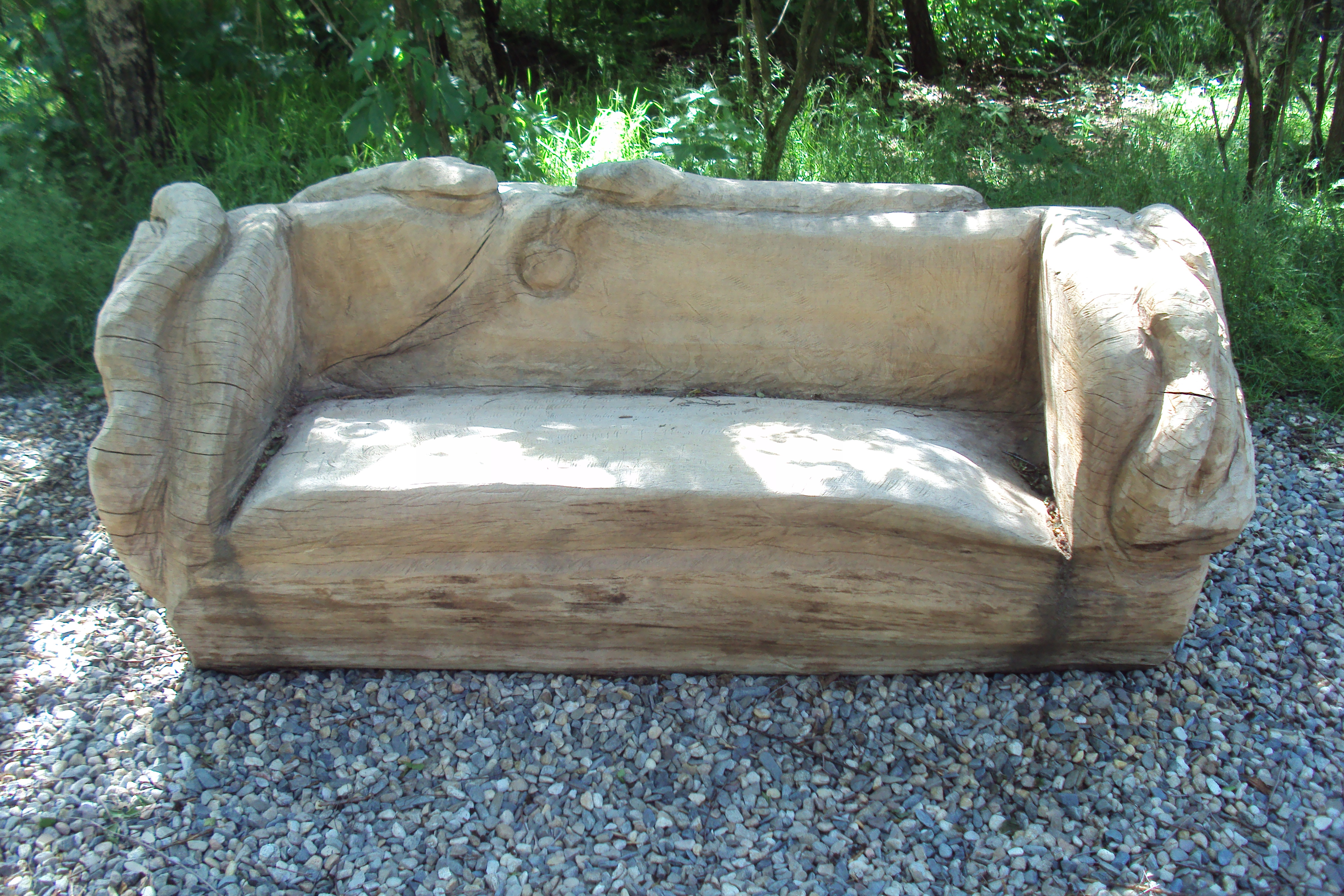 U sedmého stanoviště naučné stezky U kapličky je ze dřeva vyřezaná lavice